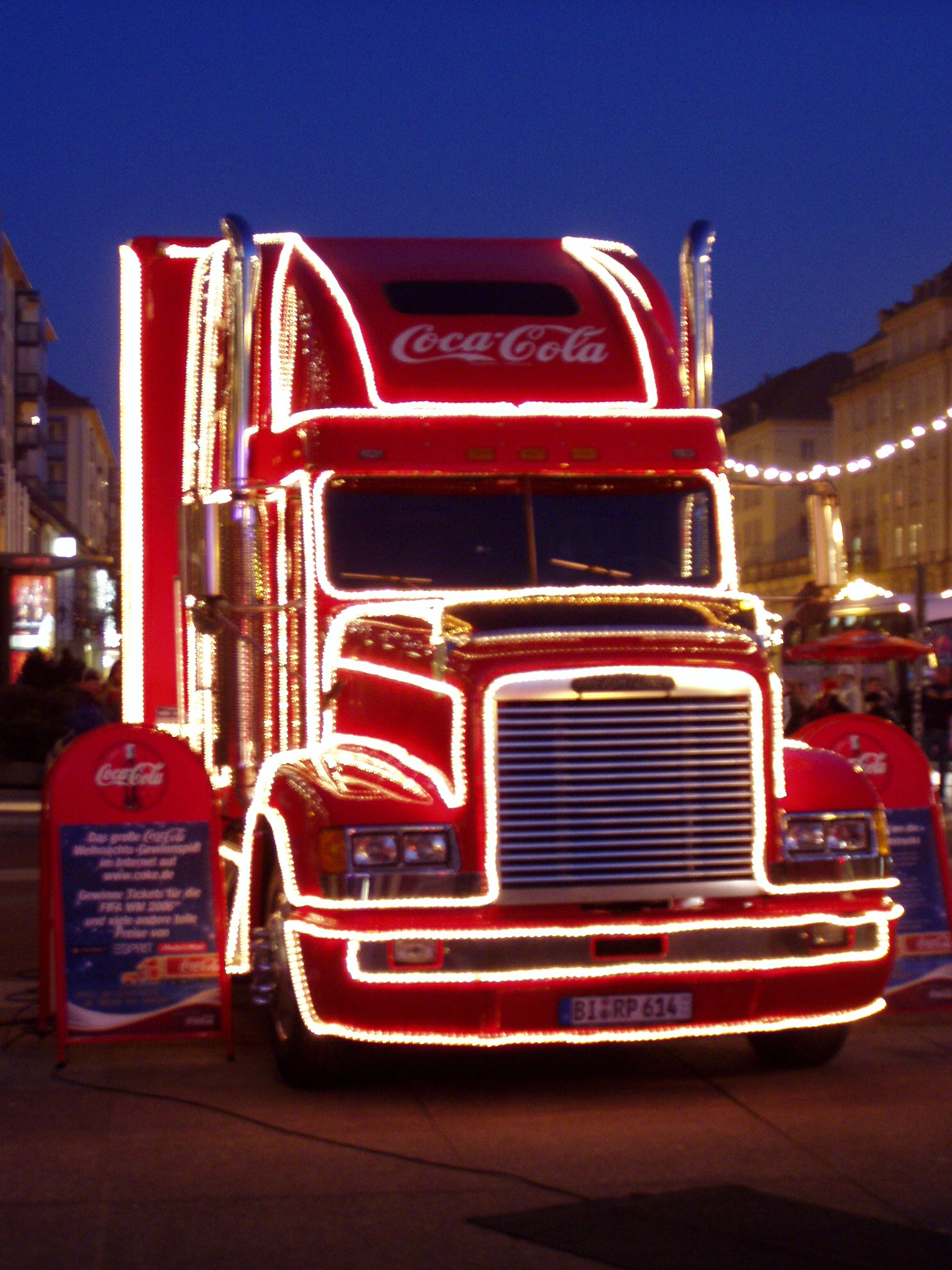 Coca-Cola Weihnachtstruck (auf dem Dresdner Striezelmarkt 2004)